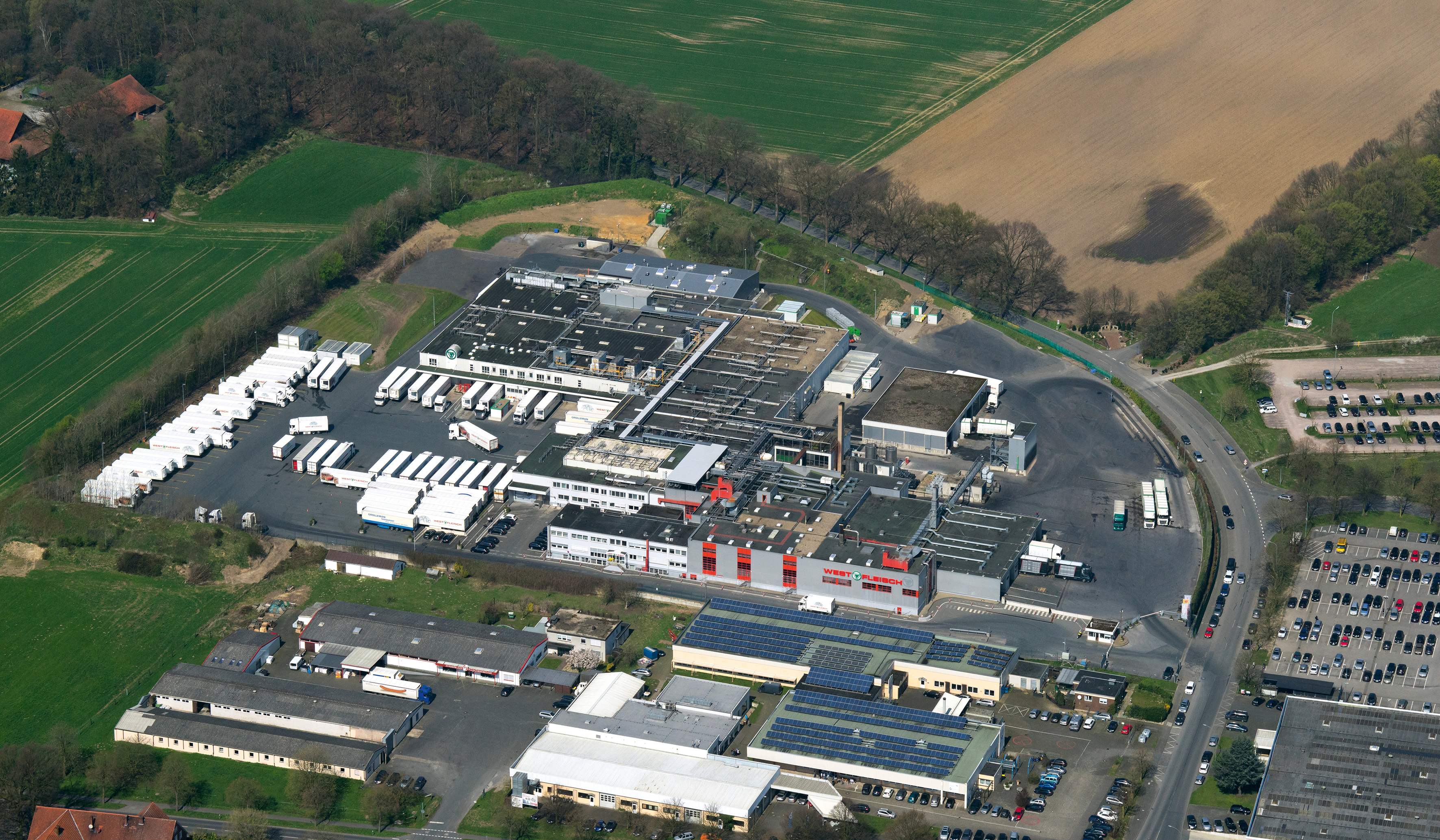 Werksgelände des Fleischcenters Coesfeld von Westfleisch SCE